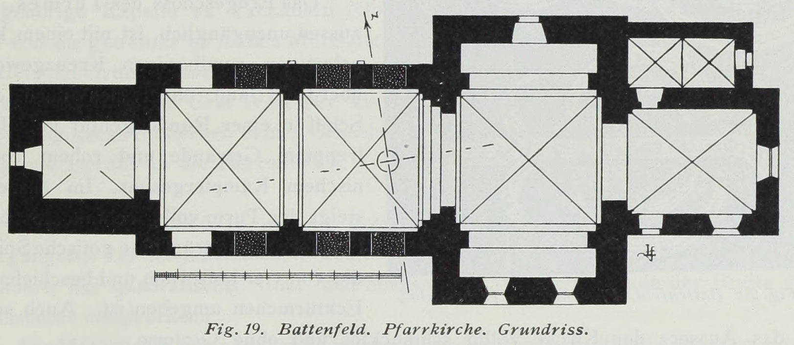 Battenfeld Pfarrkirche Grundriss